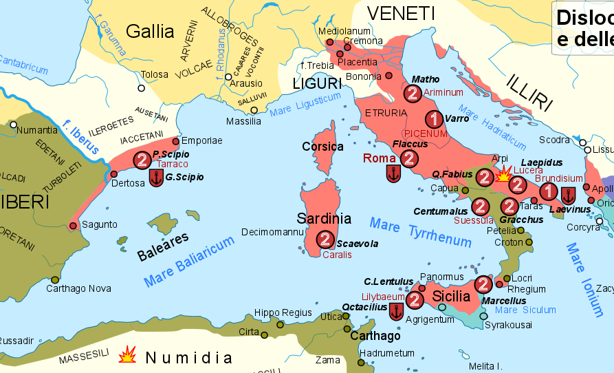 Dislocazione e dimensione delle armate romane nel 213 a.C. durante la seconda guerra punica